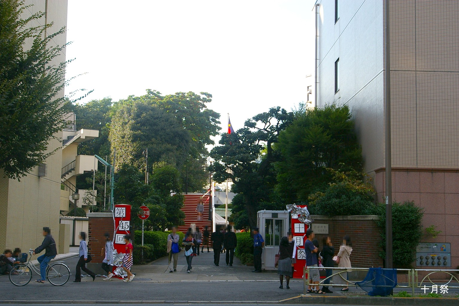 2009.5日本国内で塾生 (talk)が撮影。